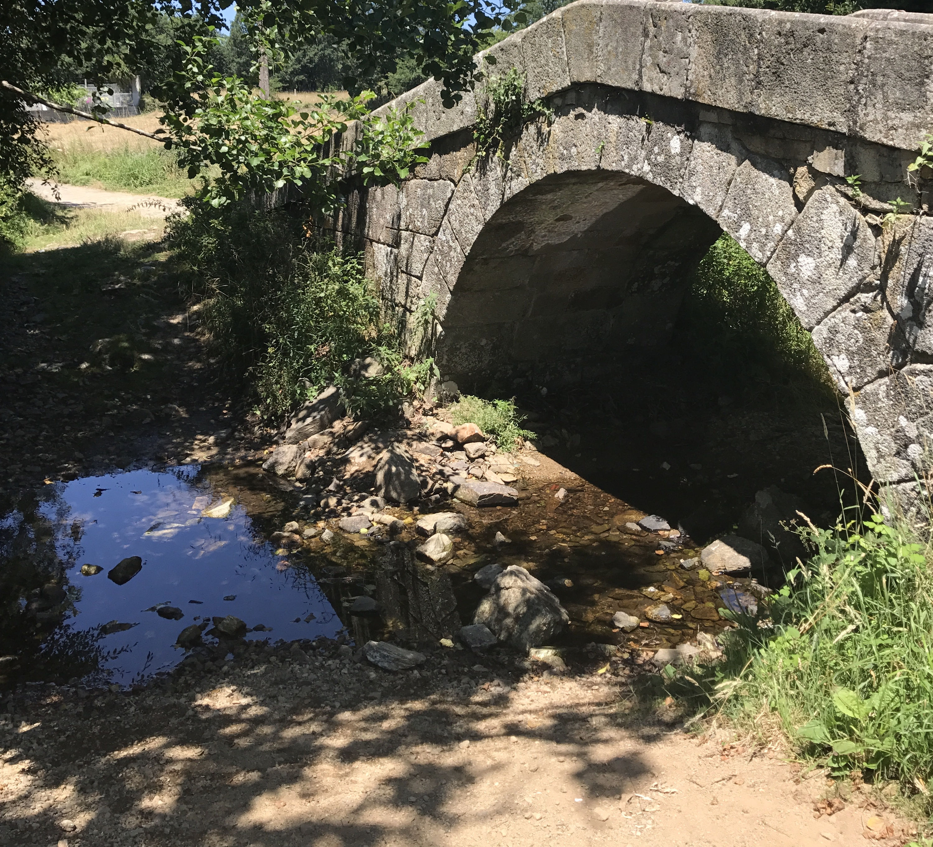 Río seco, detalle